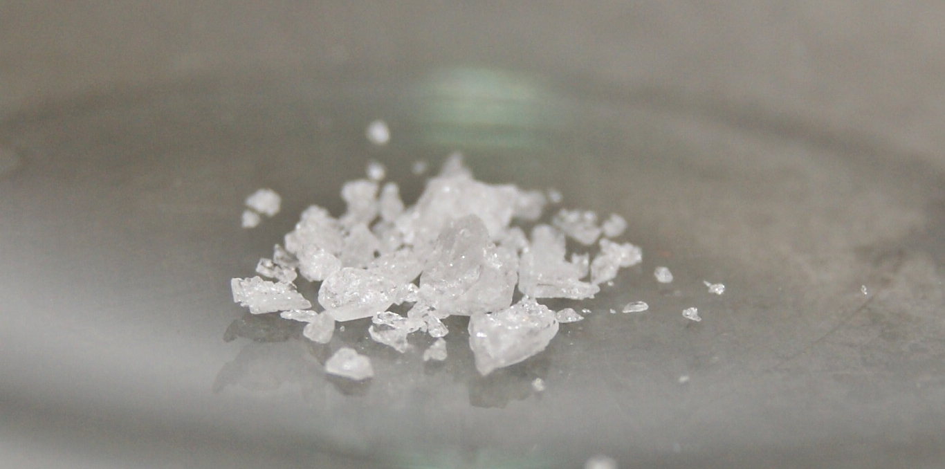 Kaliumbromat